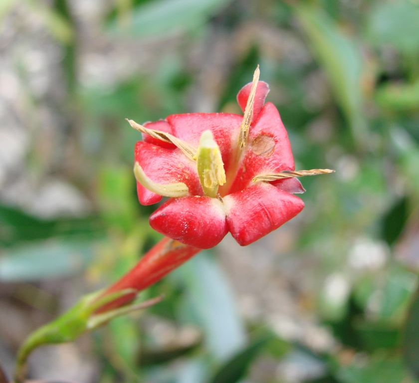 Augusta longifolia - RUBIACEAE Alto Paraíso de Goiás - Goiás - Brasil.